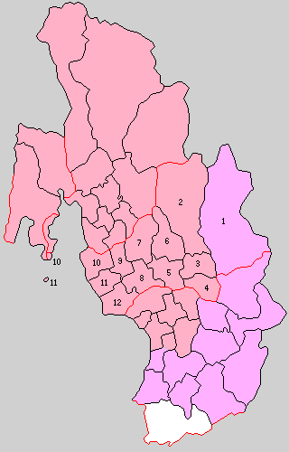 滋賀県東浅井郡の町村制時点の町村。